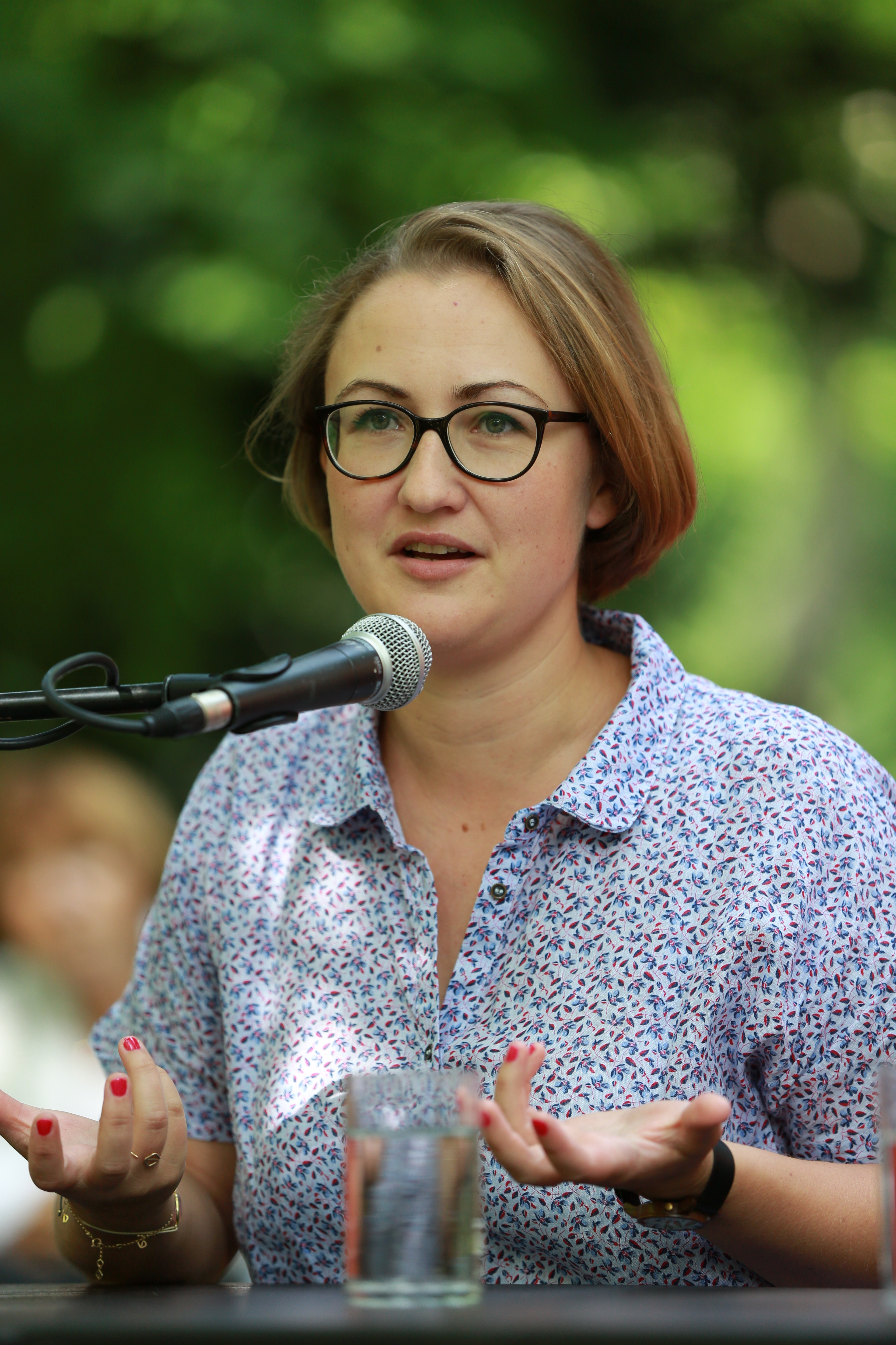 Die Autorin und Journalistin Emilia Smechowski auf dem Erlanger Poetenfest 2017